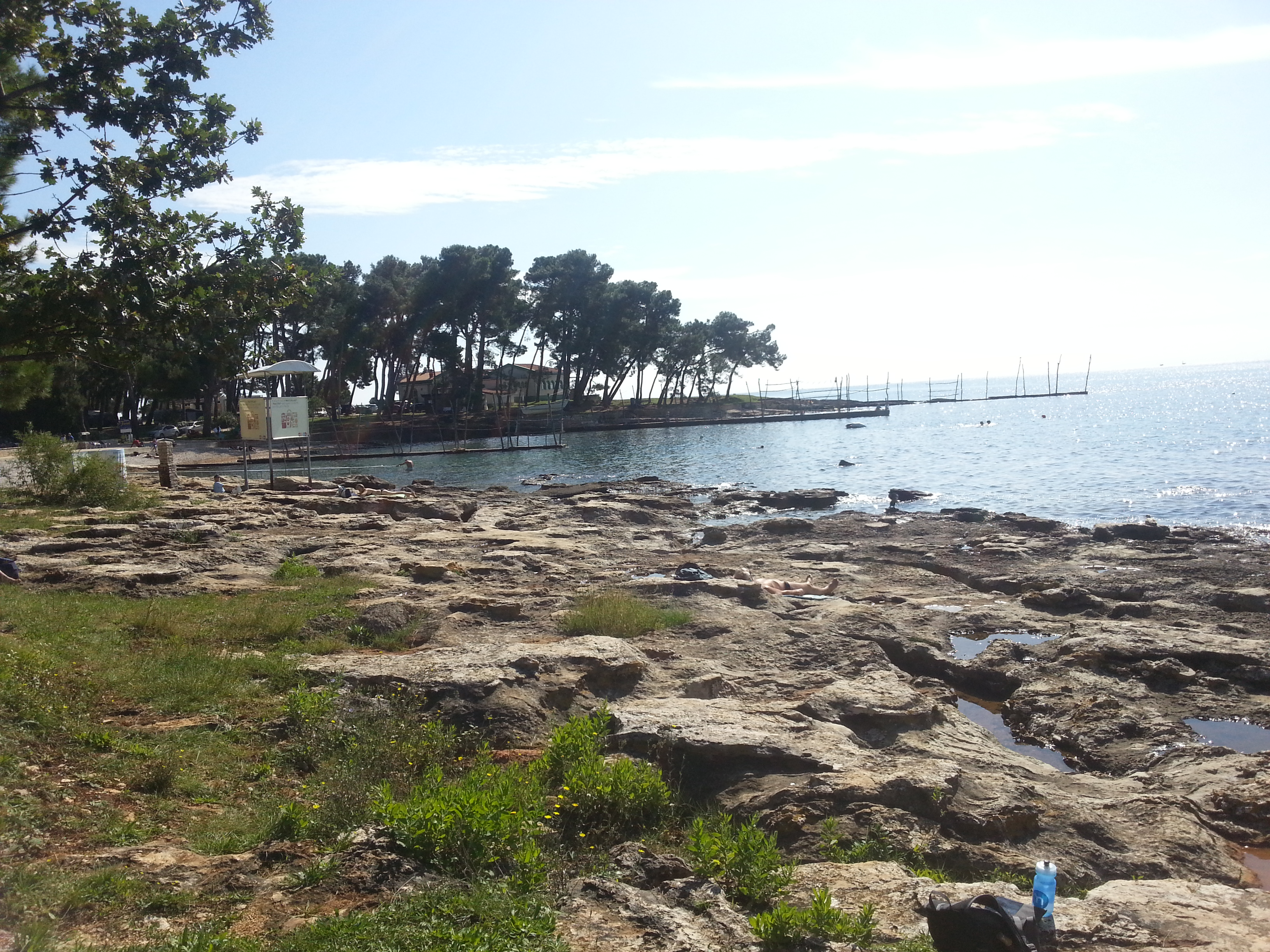 Savudrija